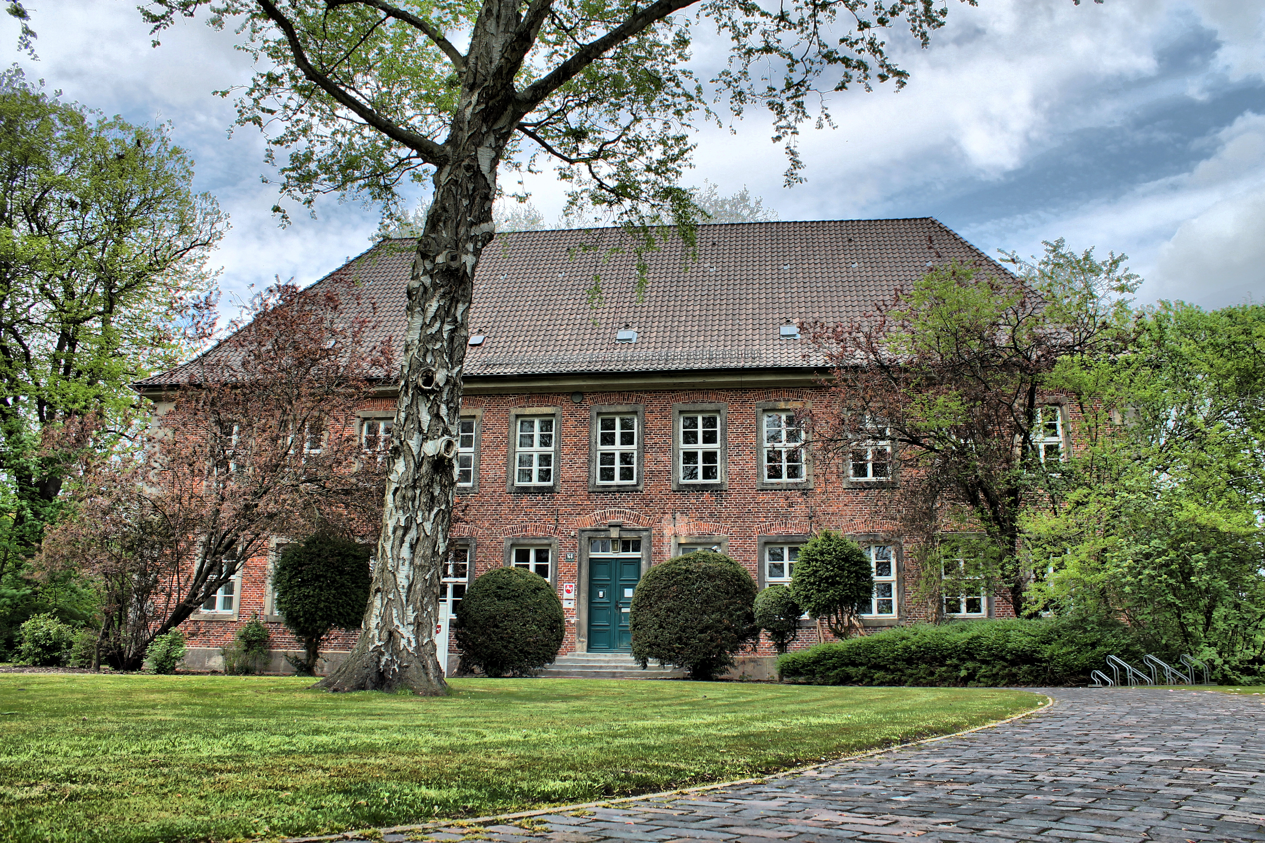 Amtsgericht Otterndorf, Am Großen Specken 6, 21762 Otterndorf 35.204.600.005 Einzel-/Gruppendenkmal